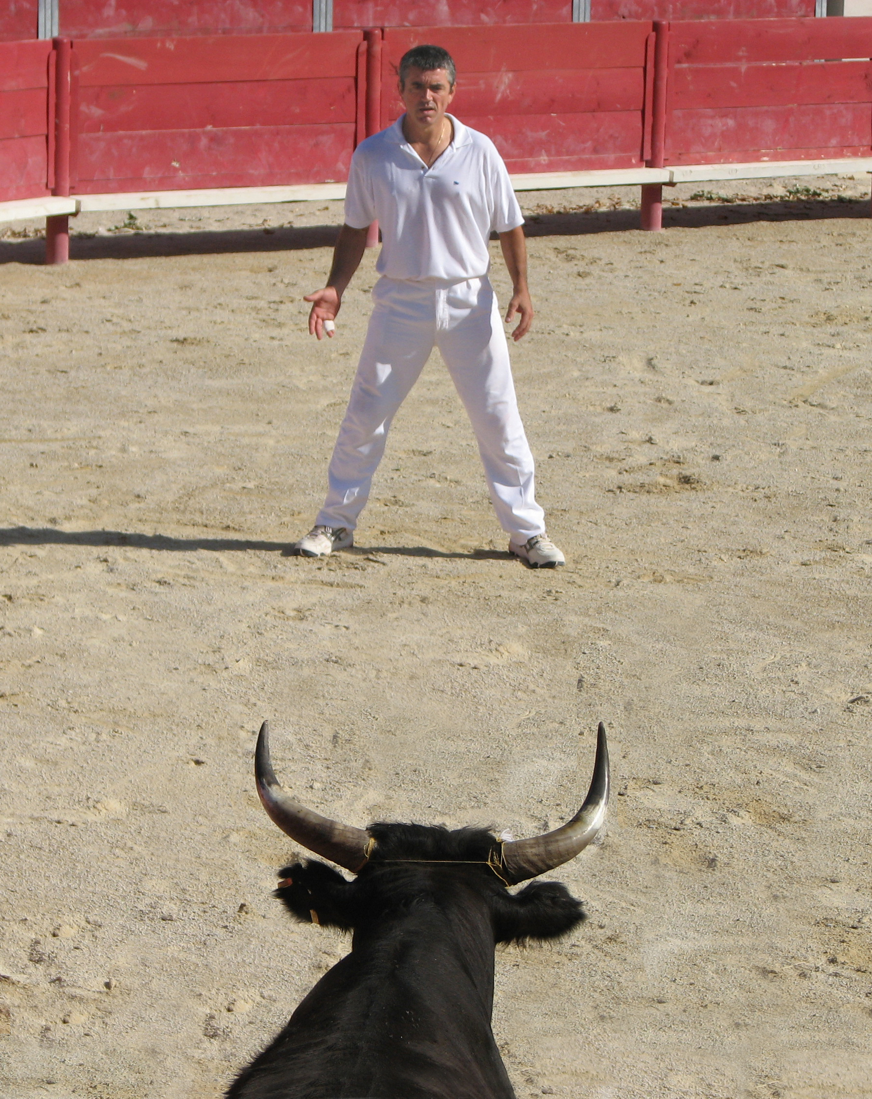 Tourneur face à un taureau de Camargue lors d'une Course camarguaise à Aimargues (Gard).